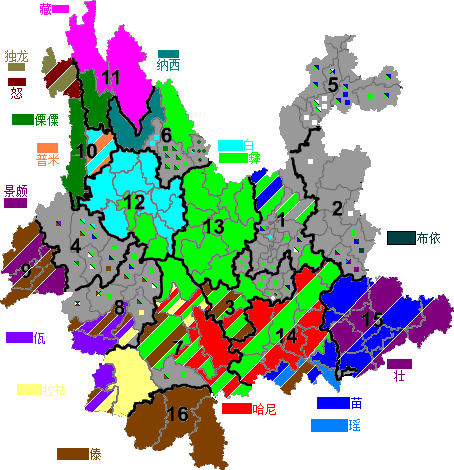 云南民族自治地方